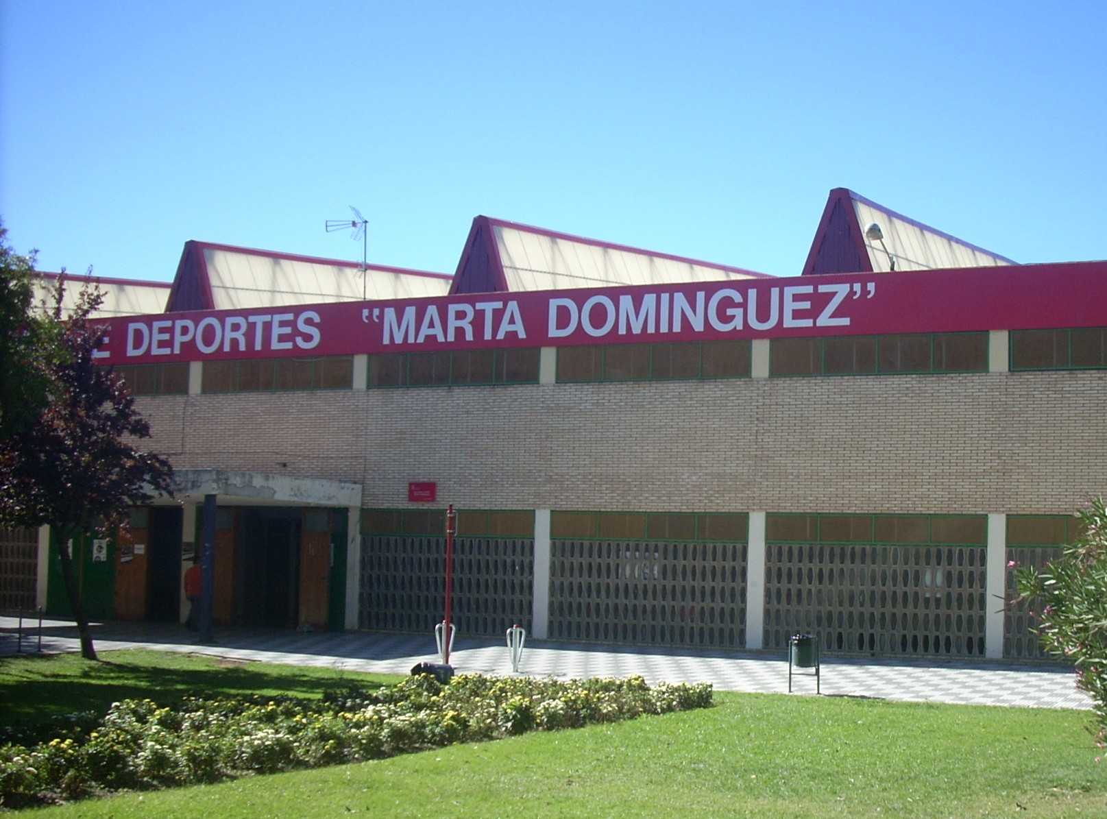 Pabellón Municipal de Deportes Marta Domínguez de Palencia (España)